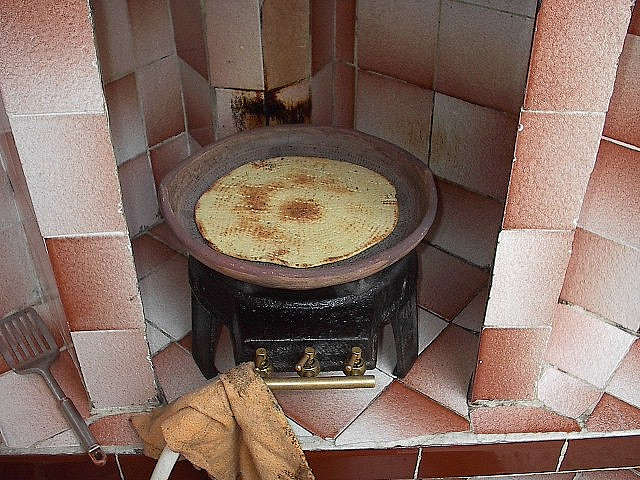 flatbread_kesera